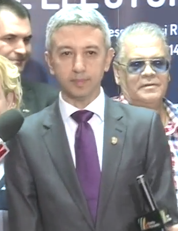 Dan Diaconescu după depunerea candidaturii la Președenție în 2014. The video was published on the official YouTube Channel, under a CC license.